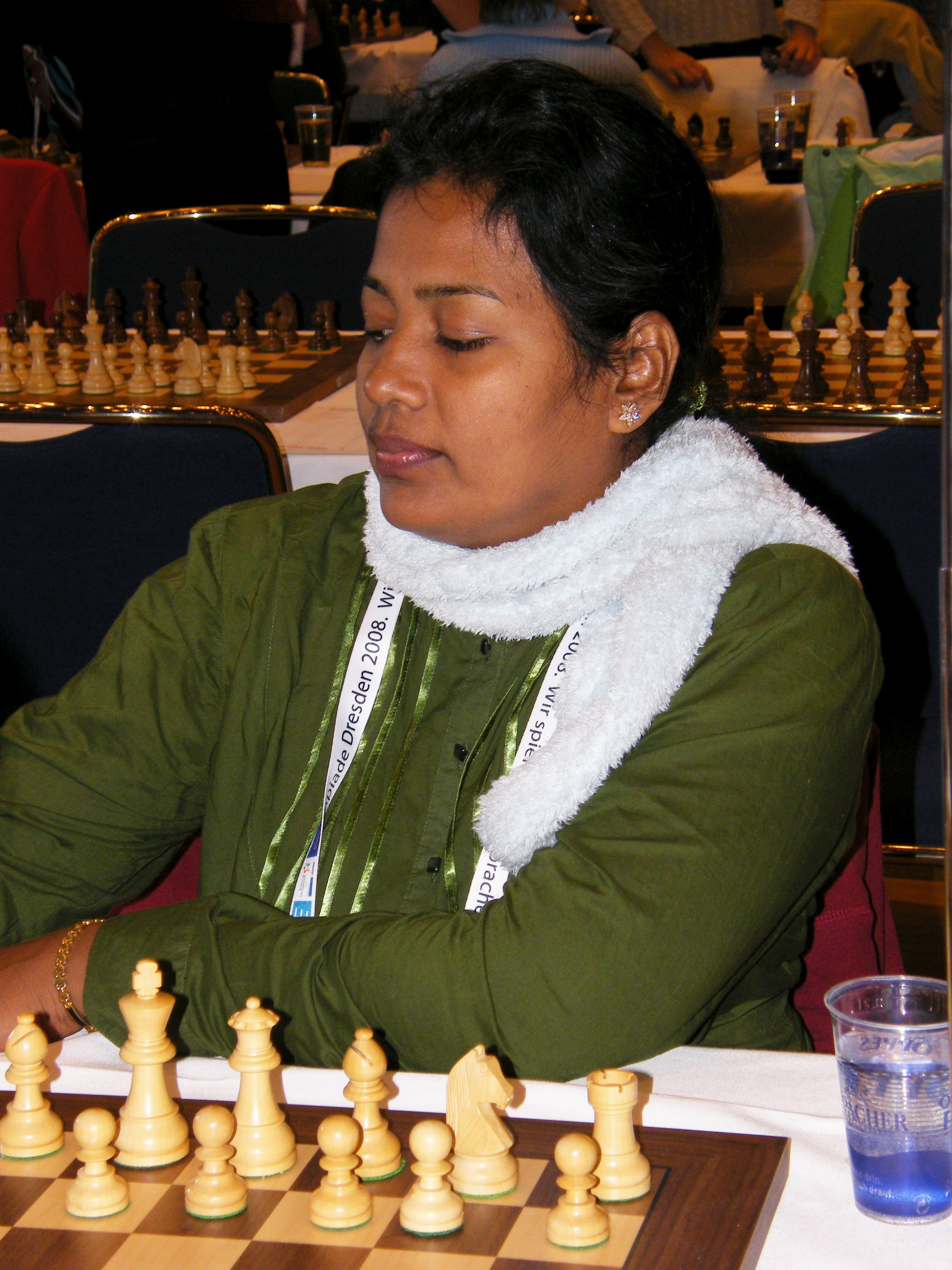 G.V. Wijesuriya bei der 38. Schacholympiade in Dresden 2008